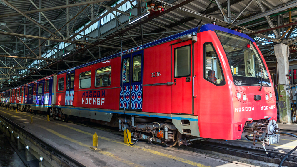 Поезд в депо